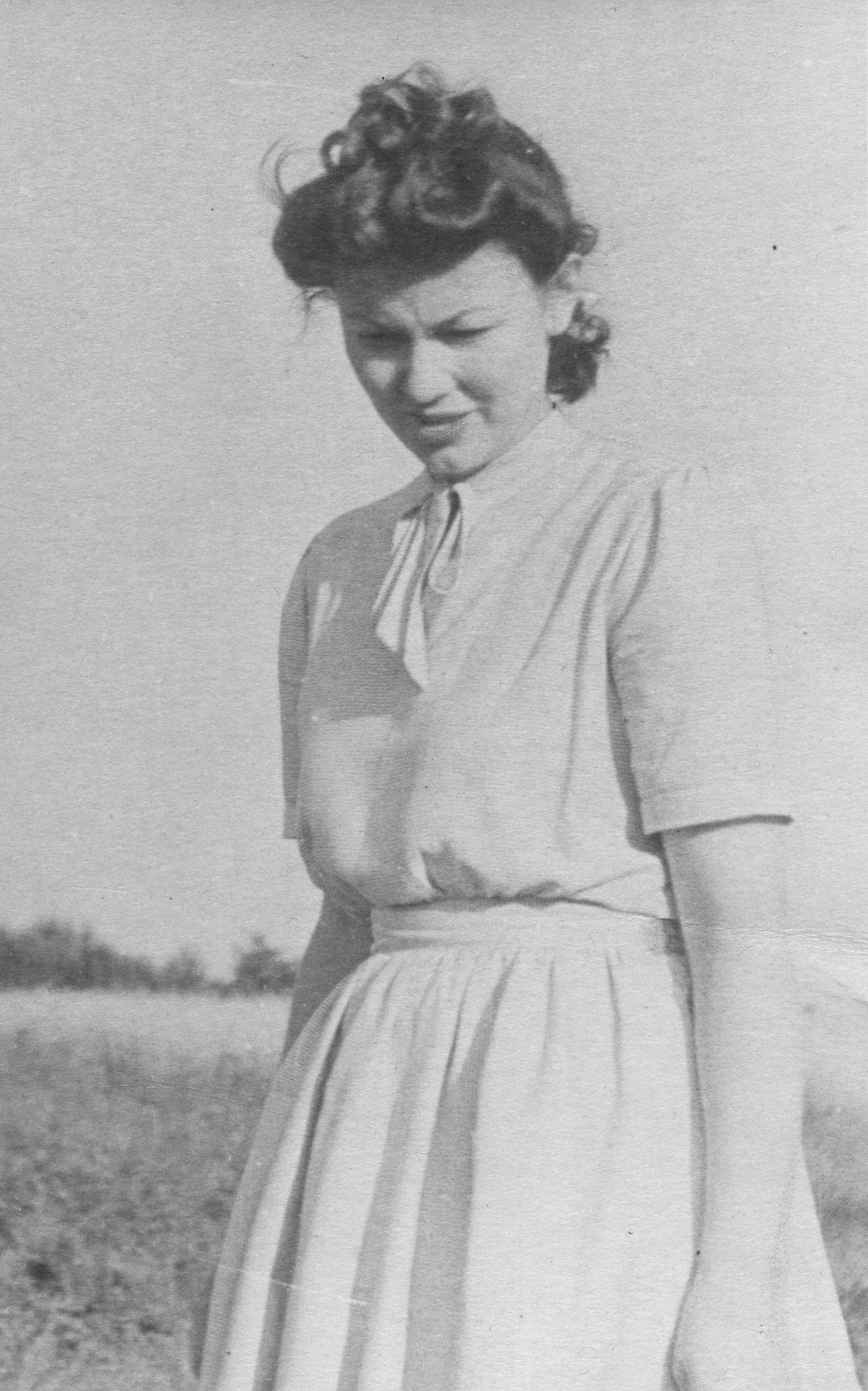 Monika Żeromska, ok. 1939 r.